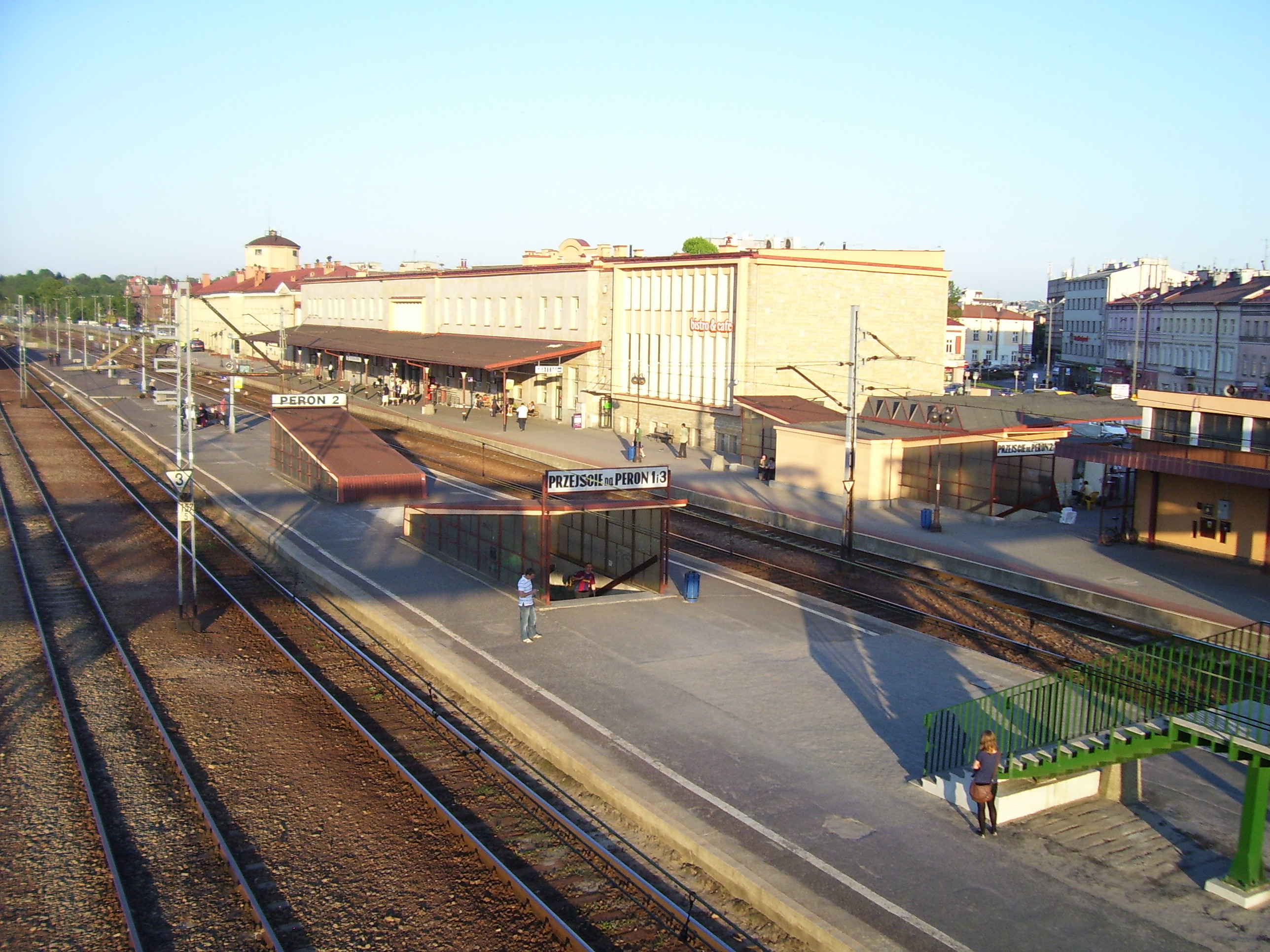 Rzeszów Główny - widok z kładki na budynek dworca